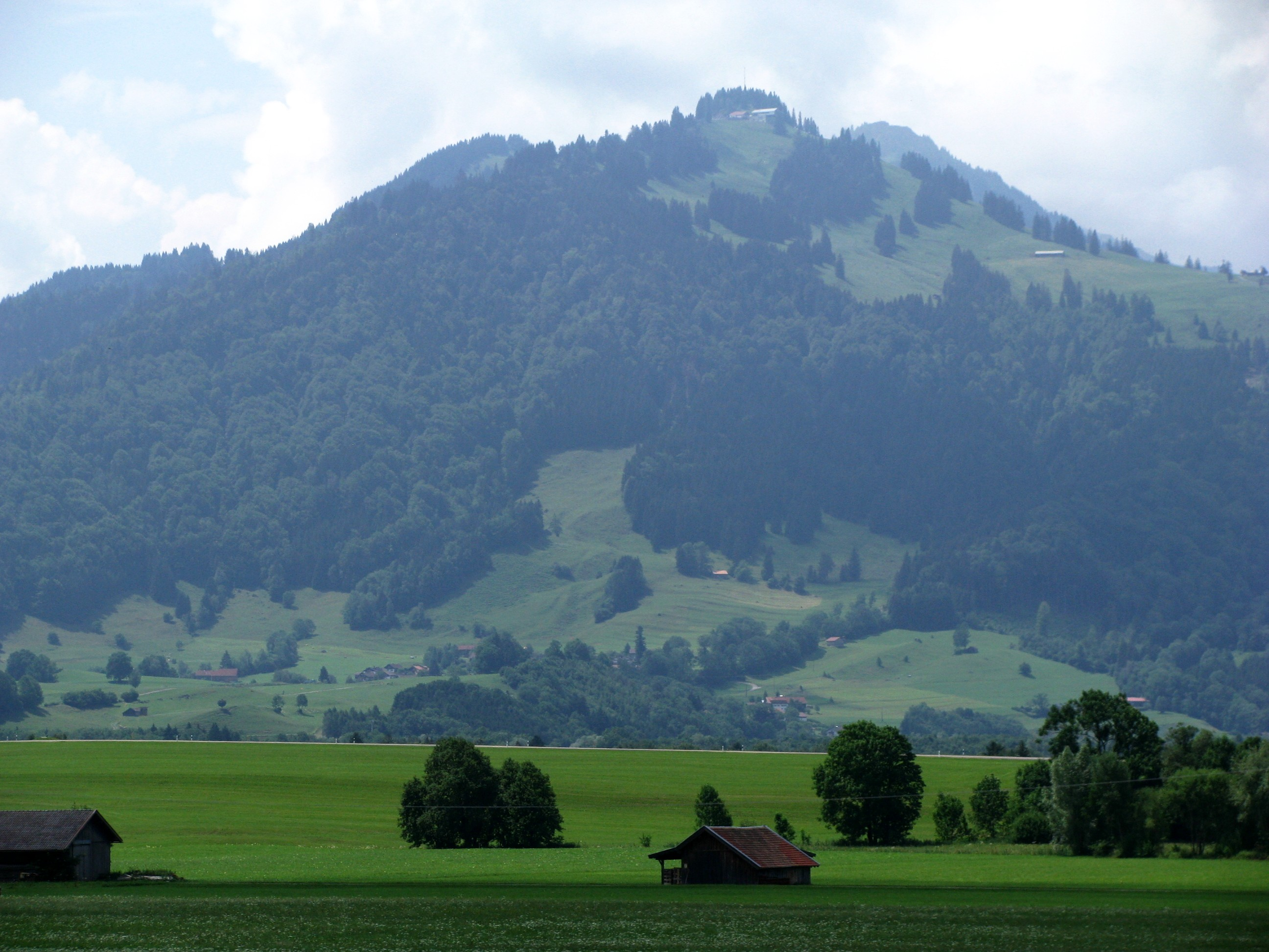 Mittagberg aus Nordost.